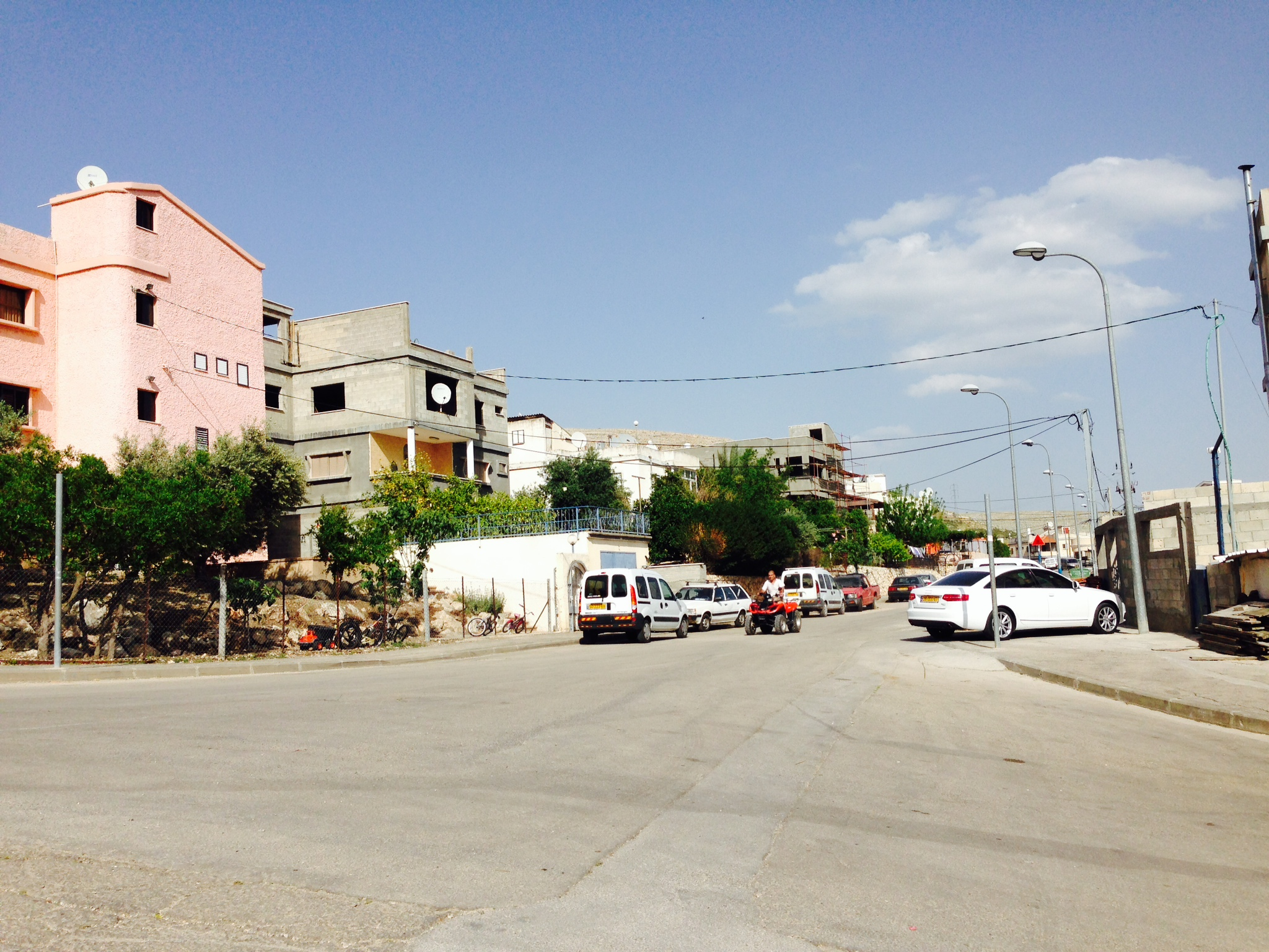 עכברה פינה ביישוב